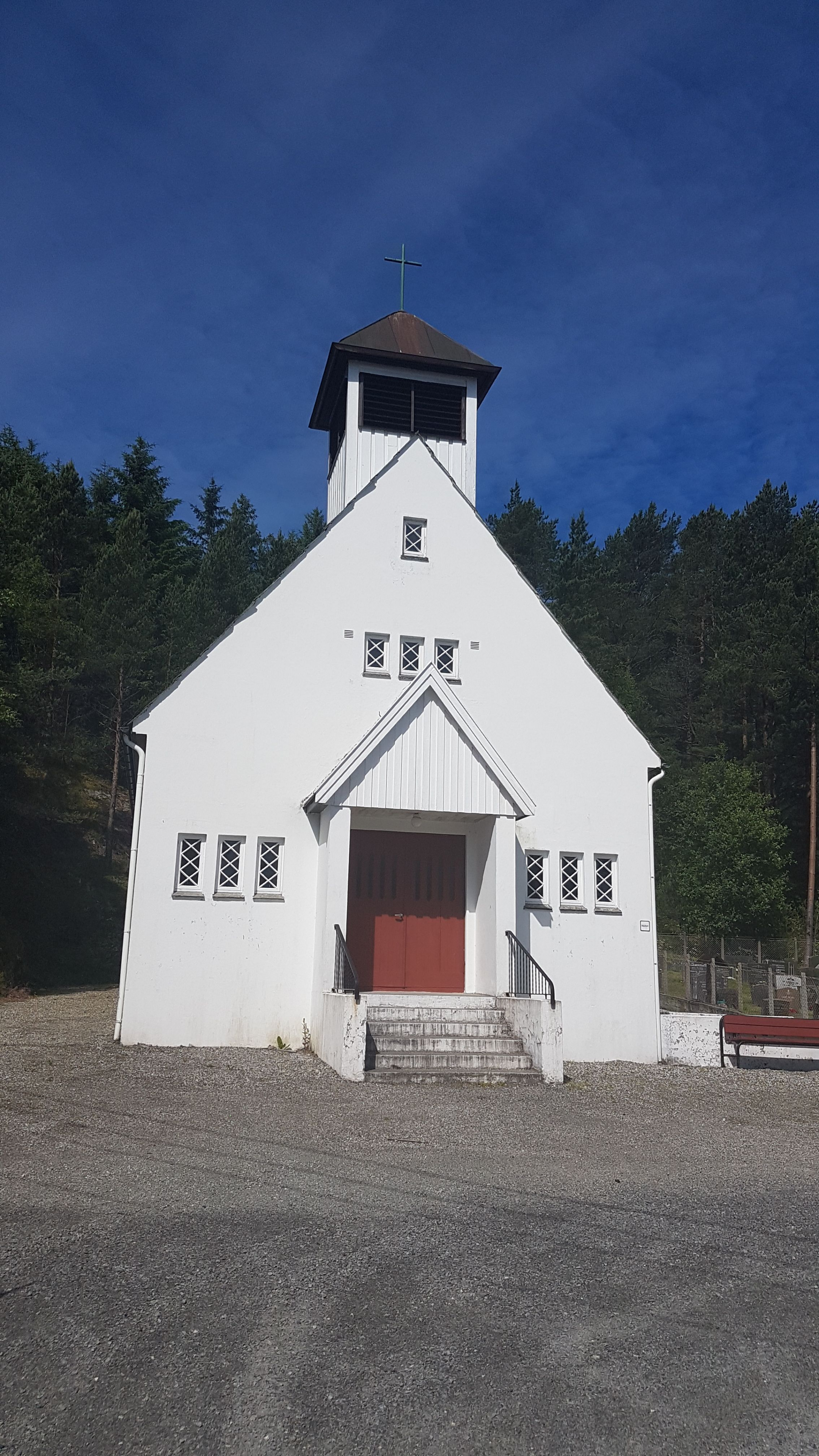 Eikeland kapell